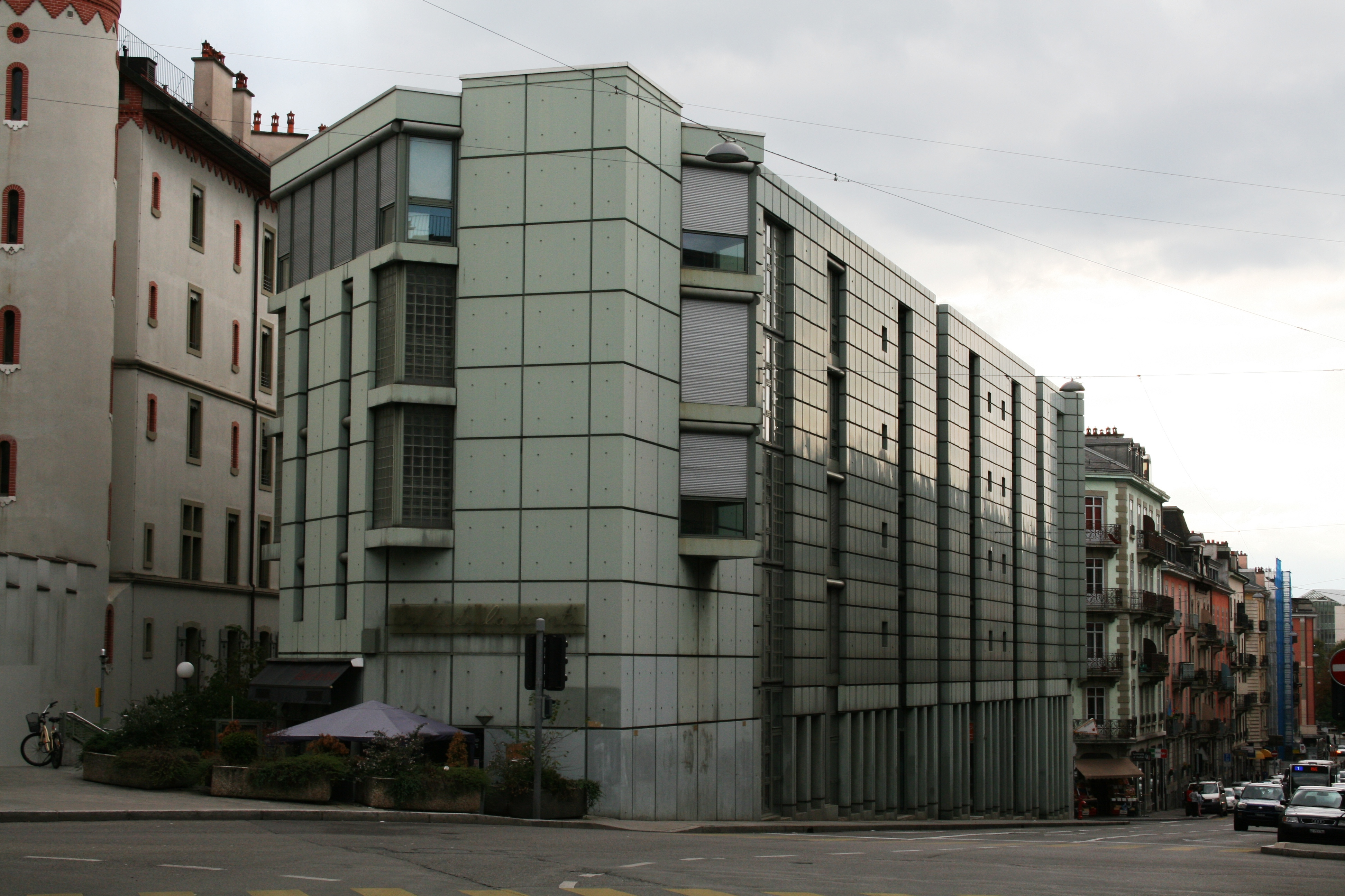 Centre d'iconographie genevoise, Passage de la Tour 2, Genève, vu depuis le boulevard du Pont d'Arve